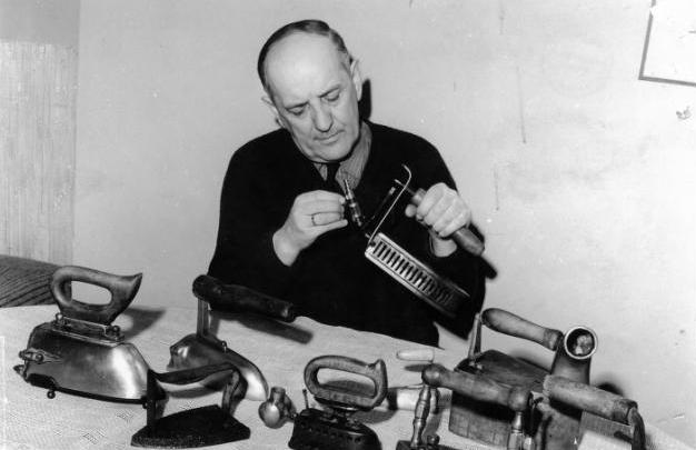 Stefan Stefański z kolekcjonowanymi żelazkami